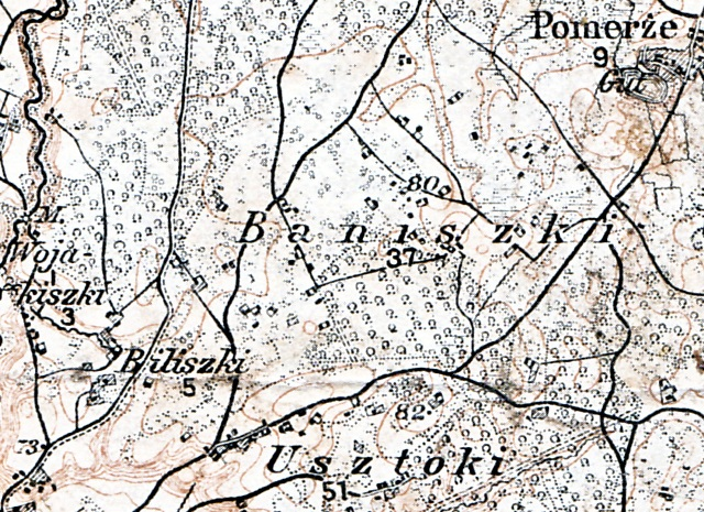 Baniškės (Baniszki) ir apylinkės. 1911 m. vokiečių kariuomenės topografinio žemėlapio fragmentas (Karte des westlichen Rußlands. O. 22. Kowno).